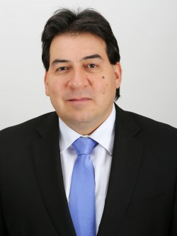 Christian Urízar Muñoz